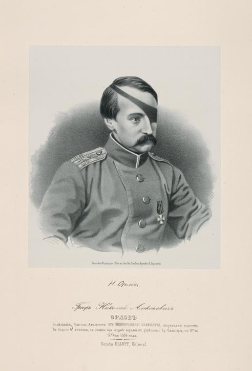 полковник Николай Алексеевич Орлов